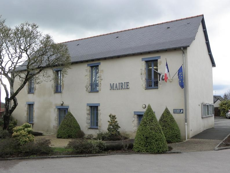 Mairie de Saint-Aubin-des-Landes (35).